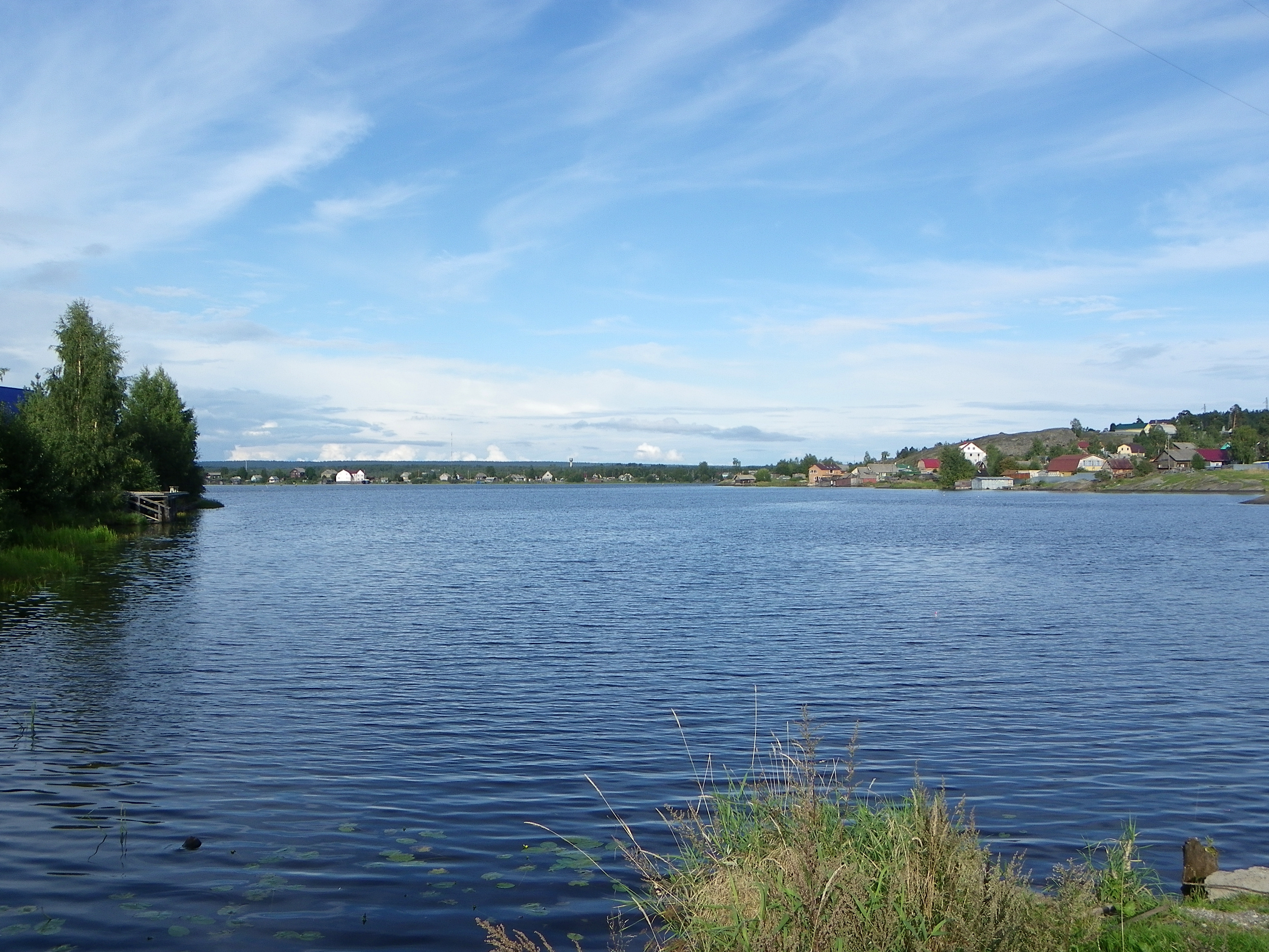 Логмозеро